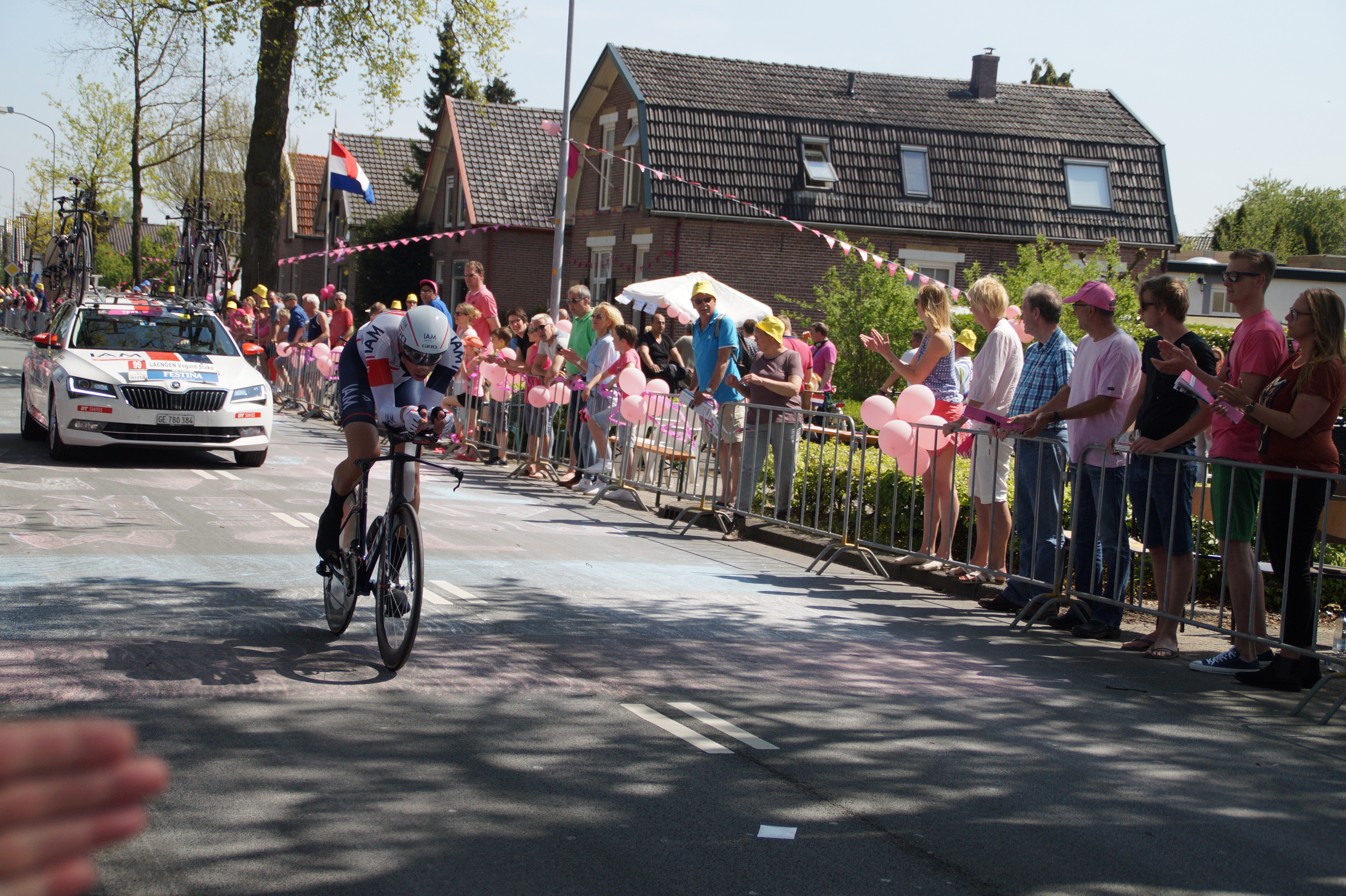 Vegard Stake Laengen